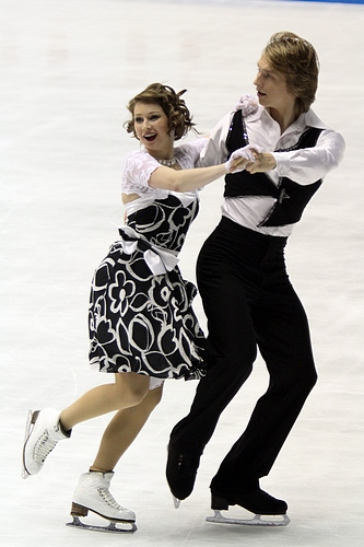 Lucie Myslivečková / Matěj Novák at the 2010 NHK Trophy. SD